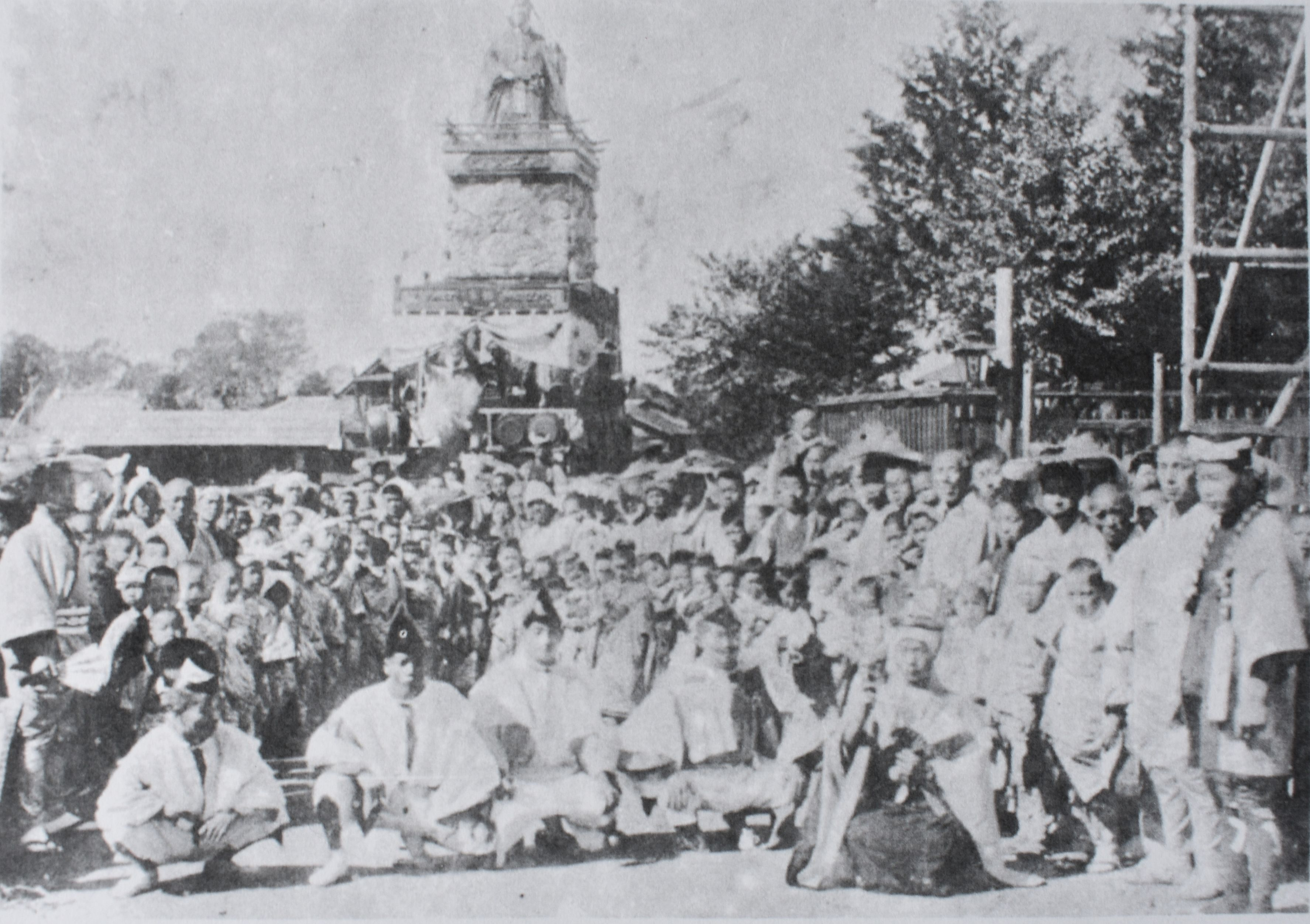 川越市 高沢町の山車